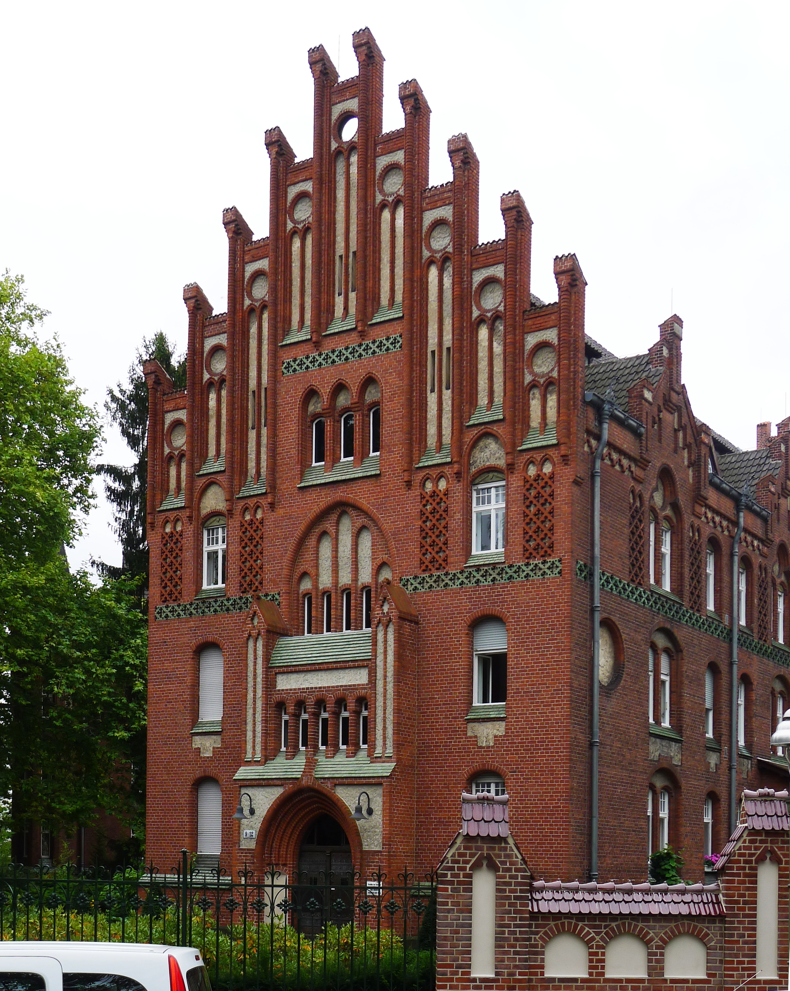 Altenheim